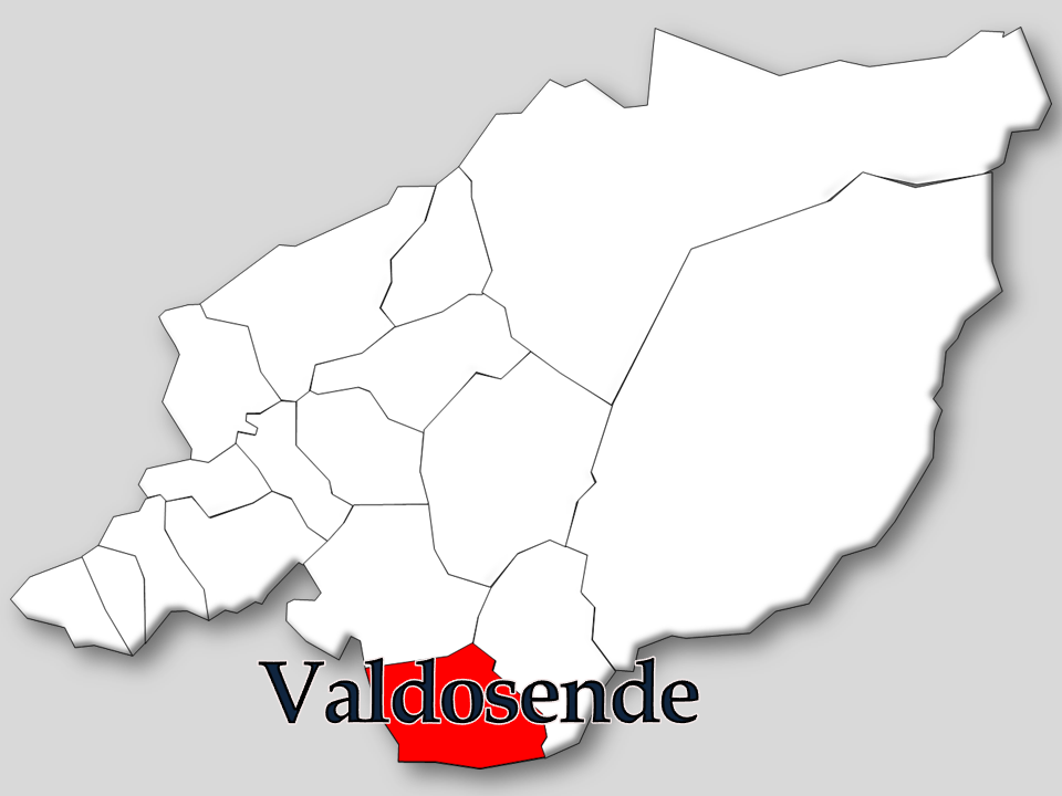 Censos 1864/2011